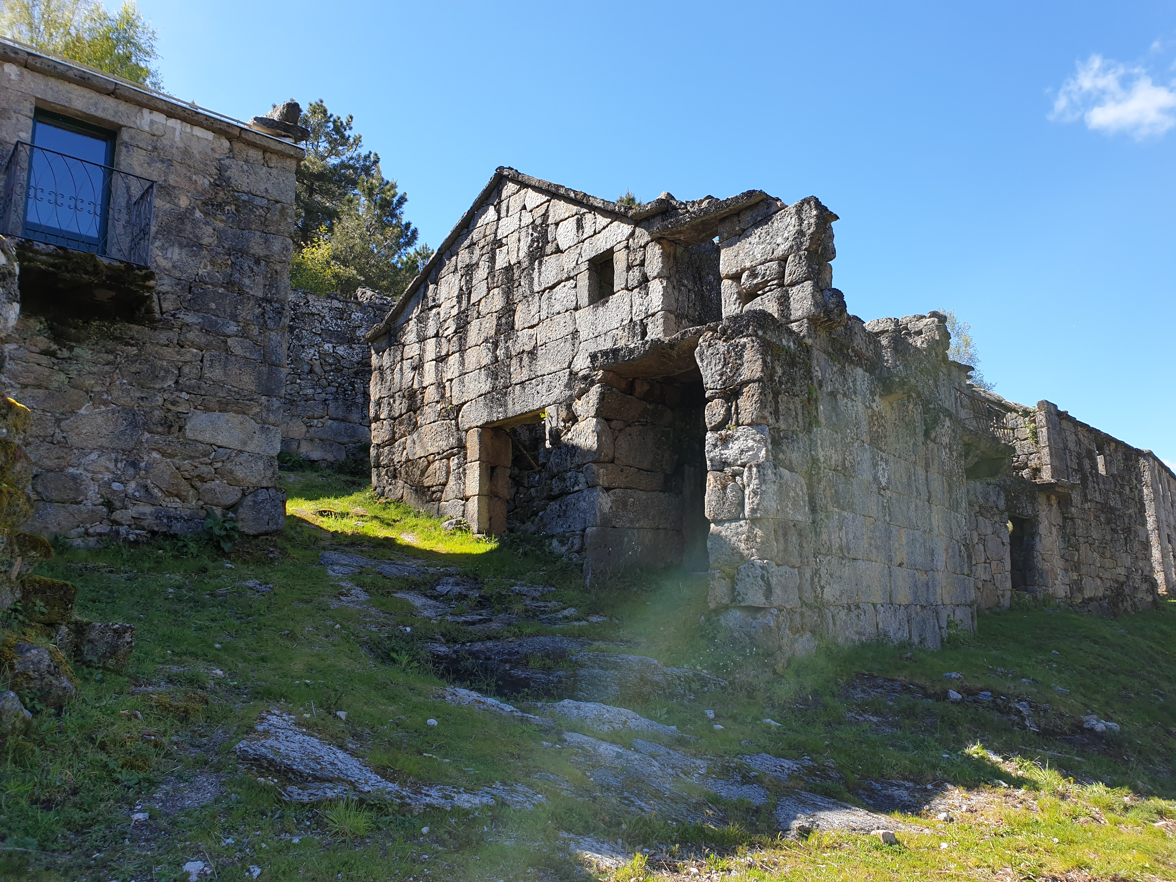 Vivenda antiga